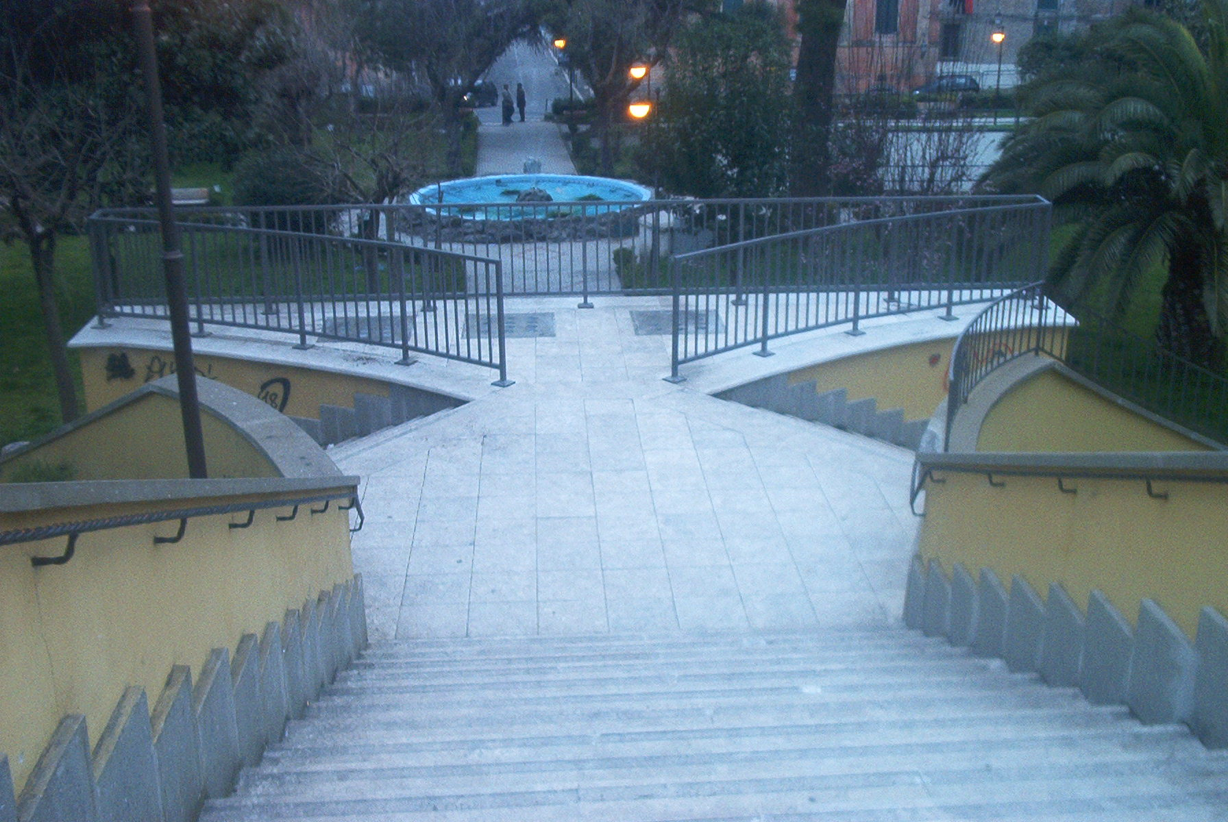 Scalinata di piazza Garibaldi a Marino